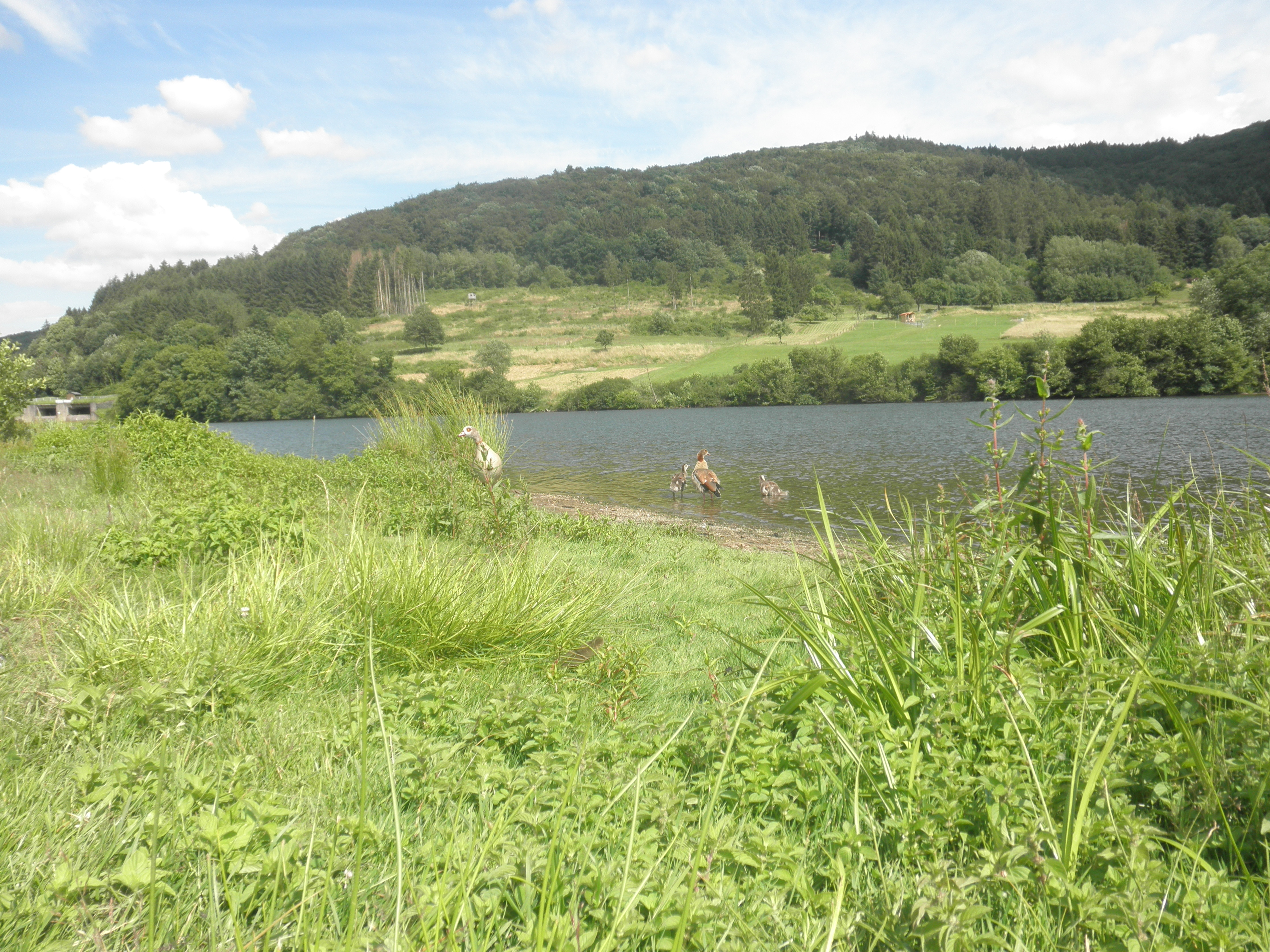 Perfstausee aus westlicher Richtung